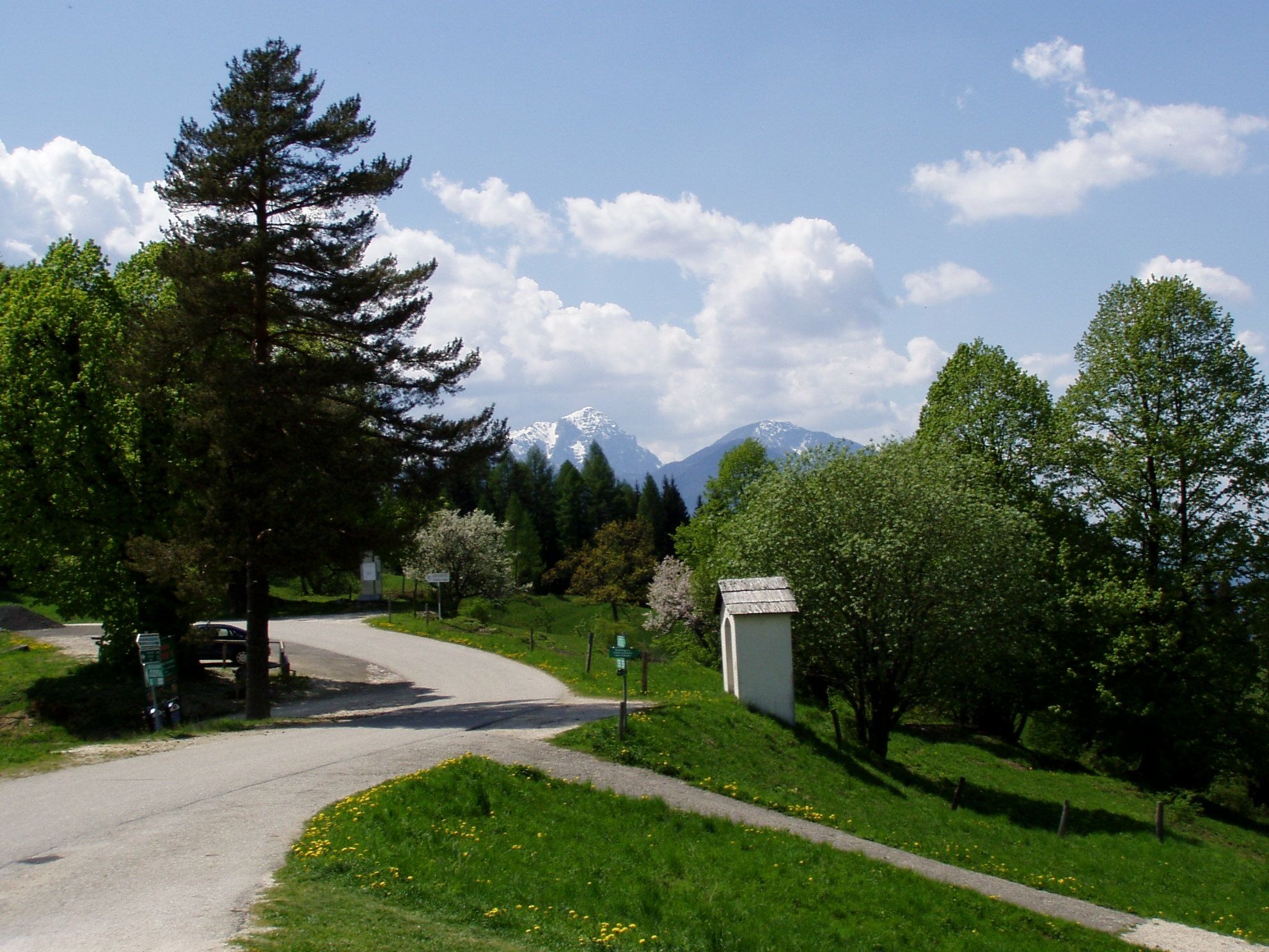 Hemmaberg in Kärnten. Parkplatz nahe Pilgerheiligtum. Blick nach Westen. Am Ort des Parkplatzes gab es ein spätantikes Gräberfeld. Im Hintergrund der Hochobir (2.139 m).